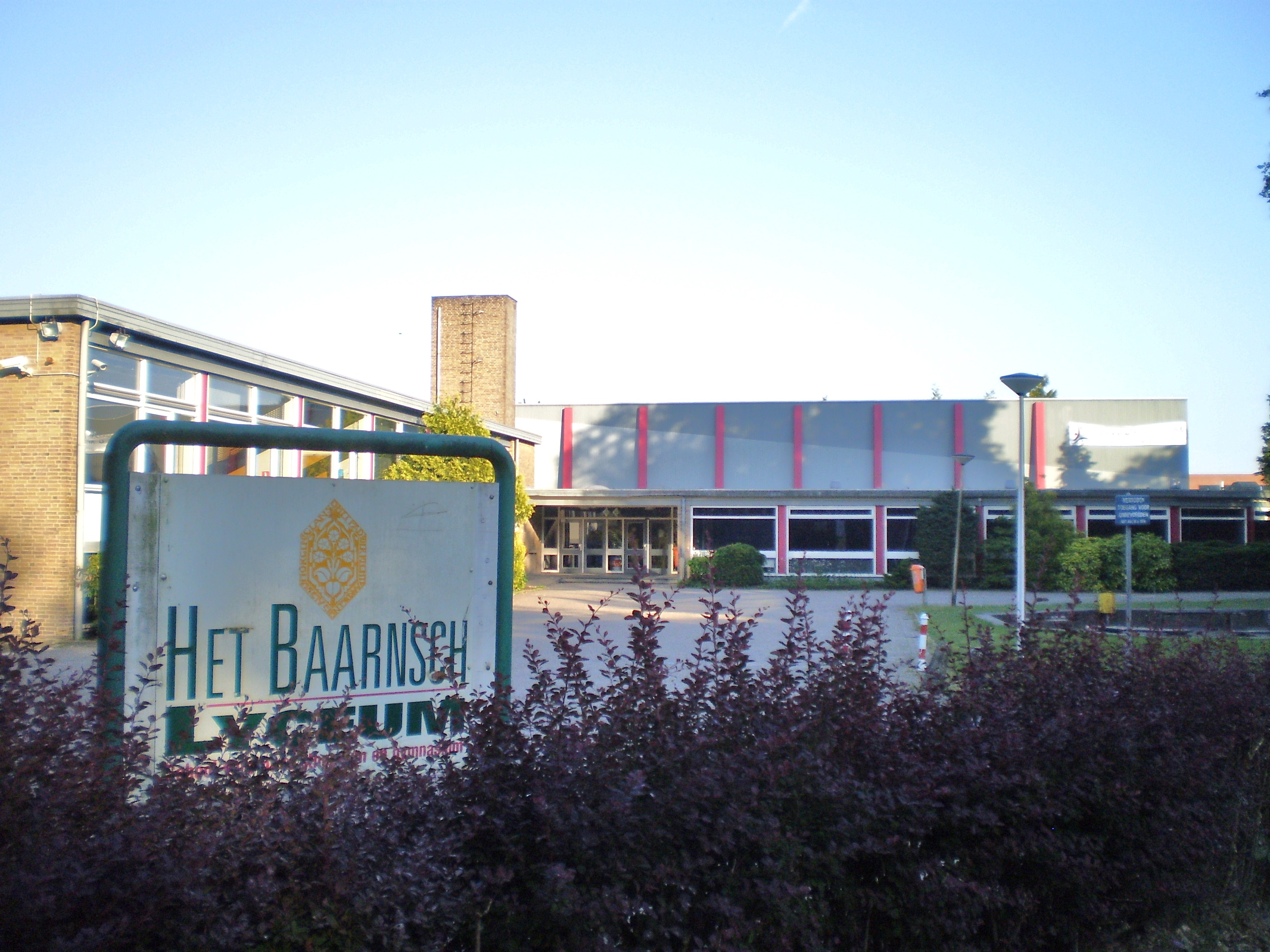 Op de eftergrûn de nijbou. Op de gimmestykseal rjochts hinget in spandoek mei de oankundiging dat dêr it nije logo komme sil